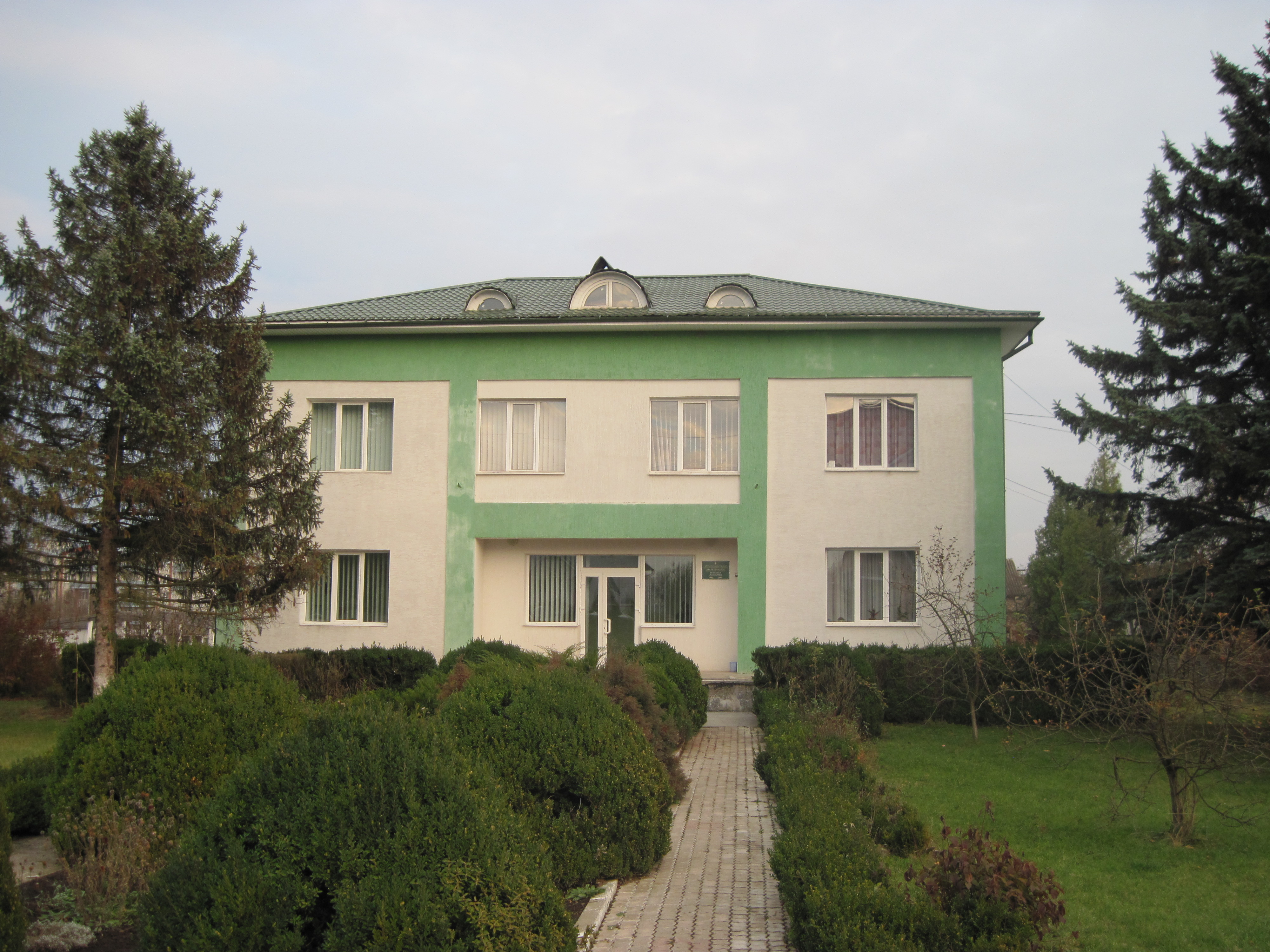 Контора Бучацького лісництва, вул. Коцюбинського